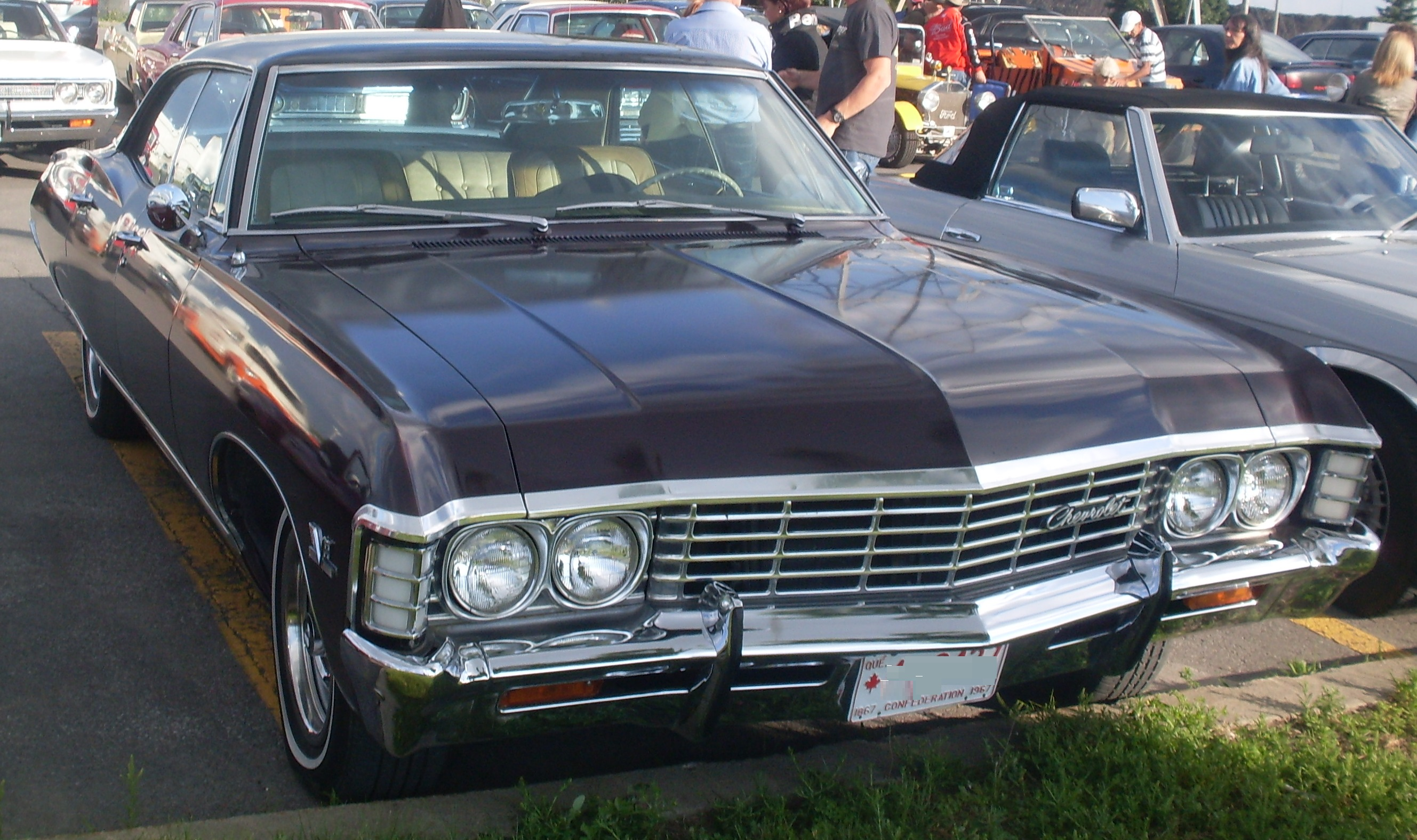 1967 Chevrolet photographed in Montreal, Quebec, Canada at Auto classique VACM Montréal.